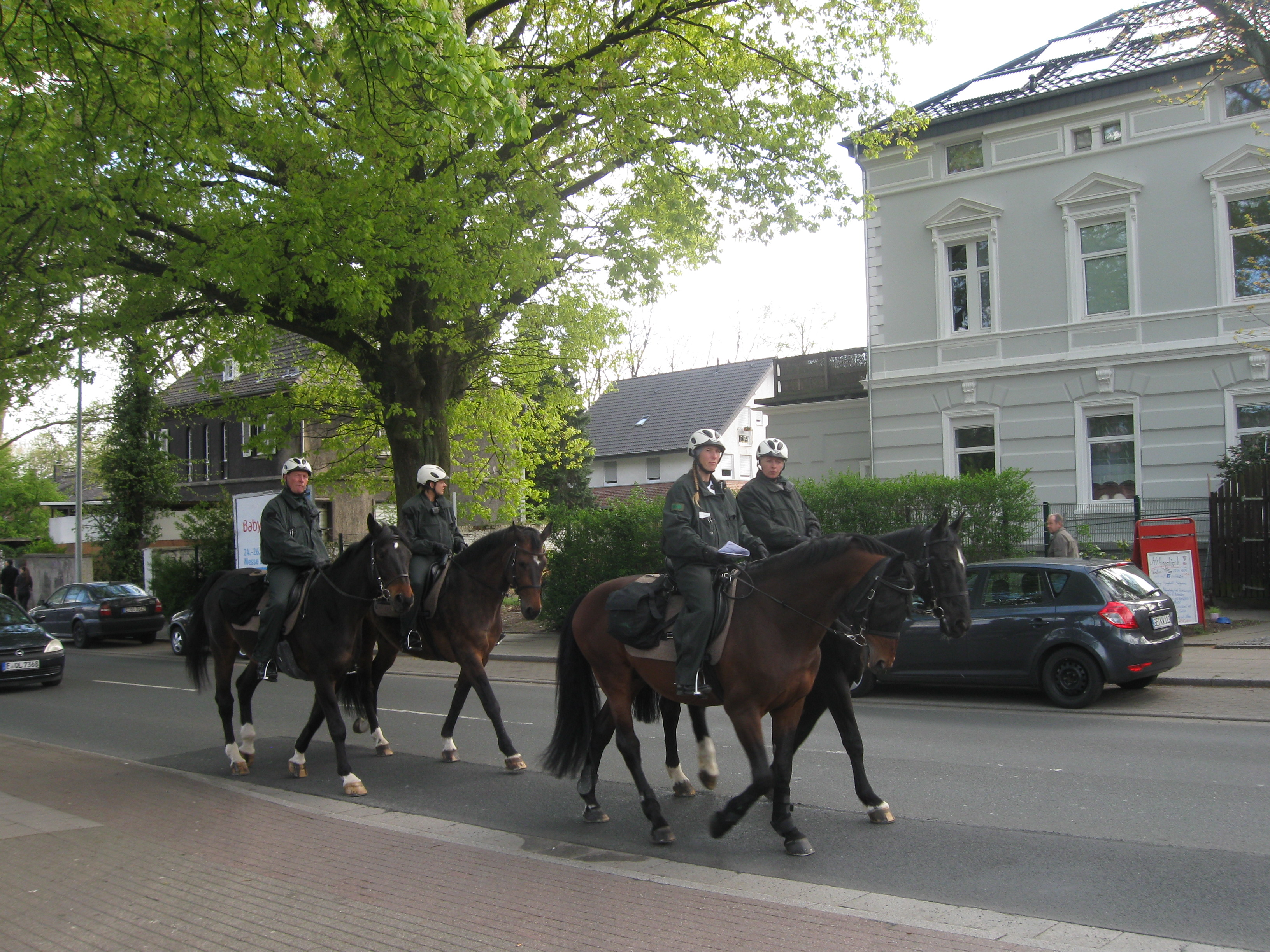 Viererformation der Landesreiterstaffel Westfalen (kaserniert in Dortmund) bei einer Maikundgebung in Essen-Kray